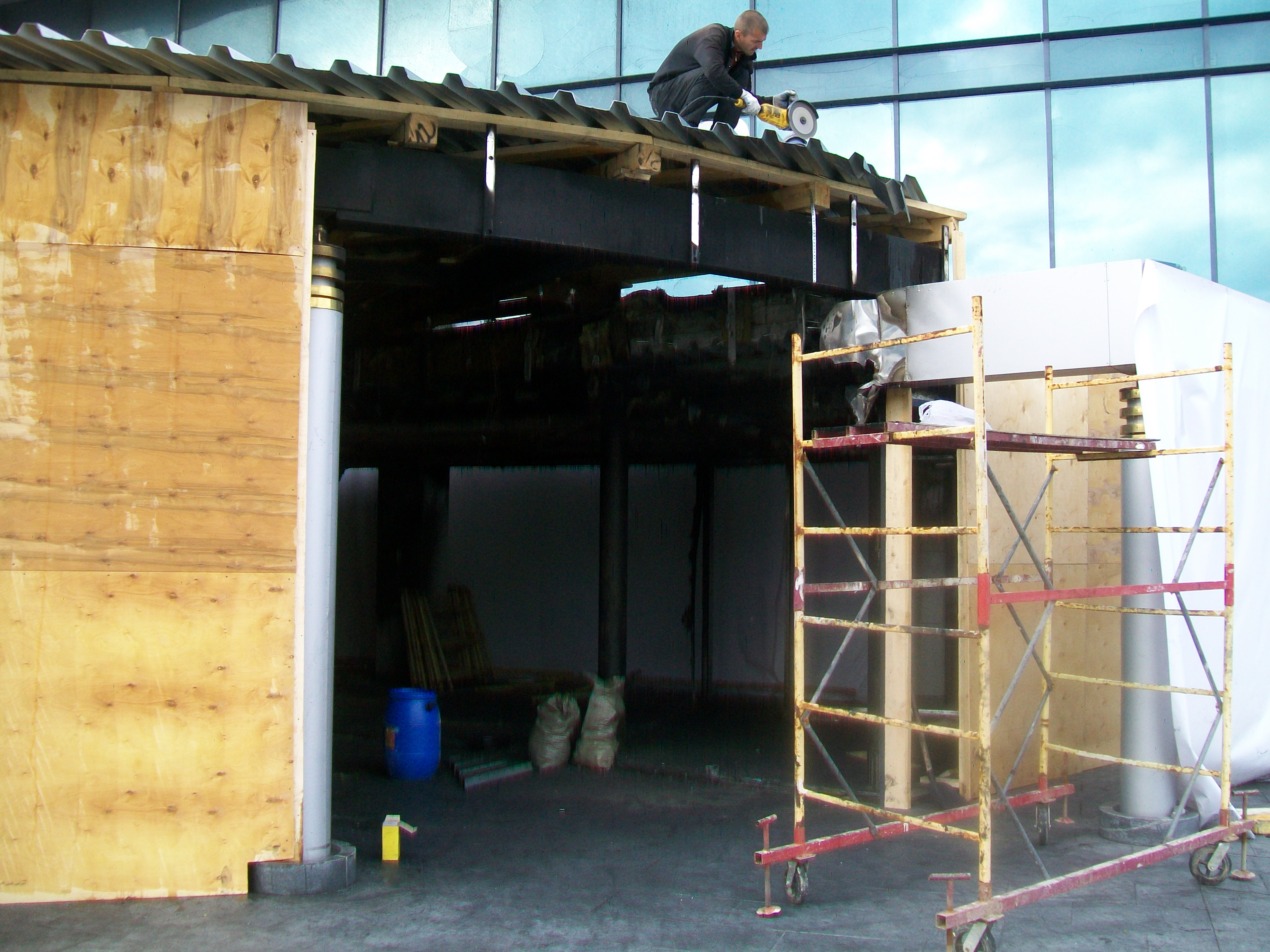 Ремонт киноконцертного театра "Космос" после поджога 4 сентября 2017 года